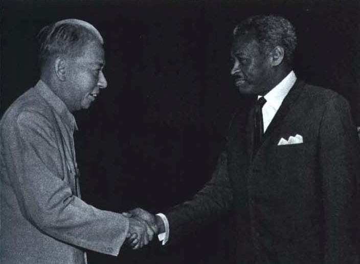 1964-11 1964年9月7日 苏丹驻华大使法赫尔·埃丁·穆罕默德向中华人民共和国主席刘少奇递交国书